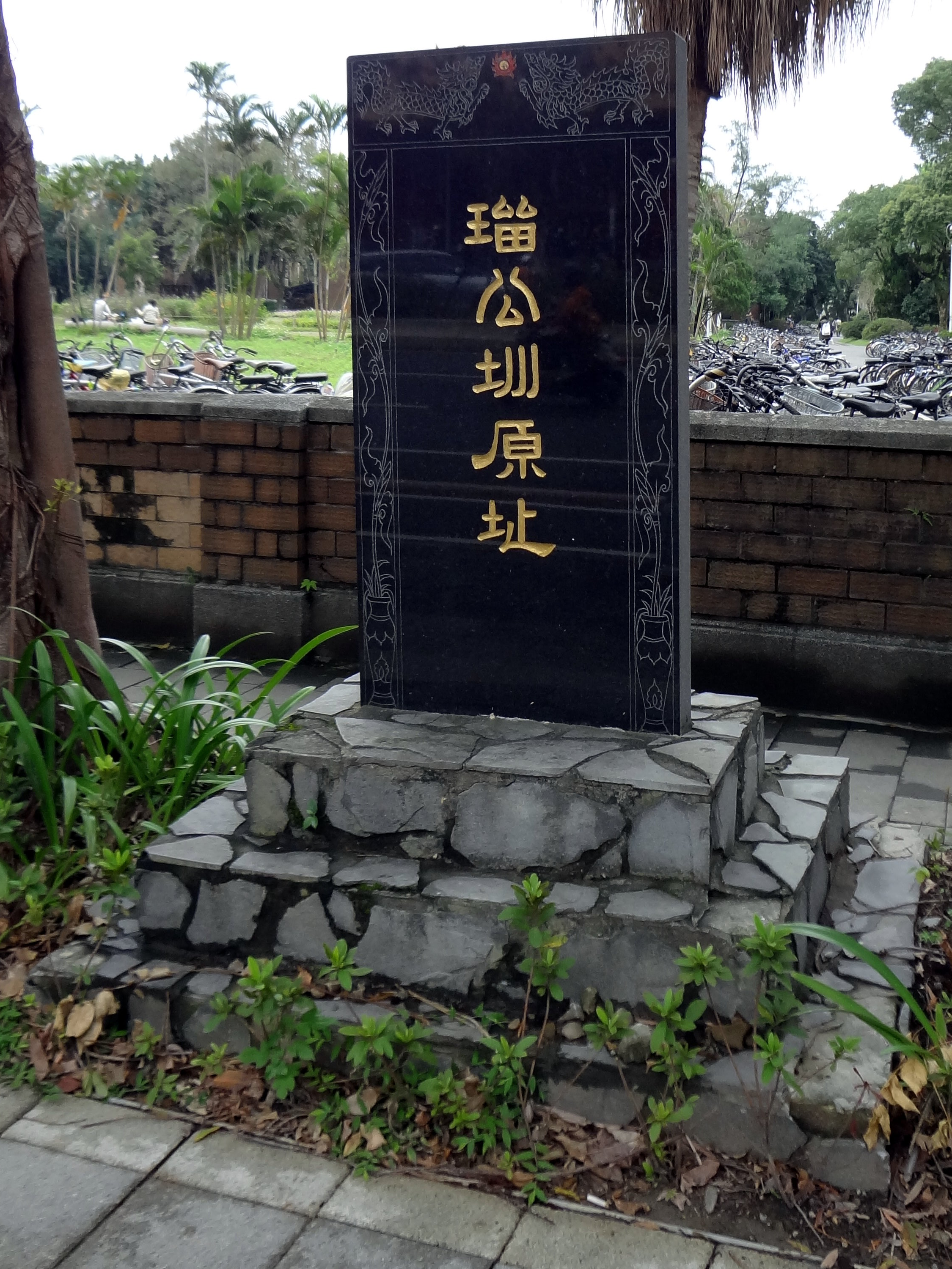 瑠公圳原址碑，1983年（中華民國72年）4月臺北市文獻委員會立，位於臺北市大安區新生南路國立臺灣大學人行道。此為正面。